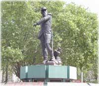 Estatua sobre el mausoleo de Leandro Gomez